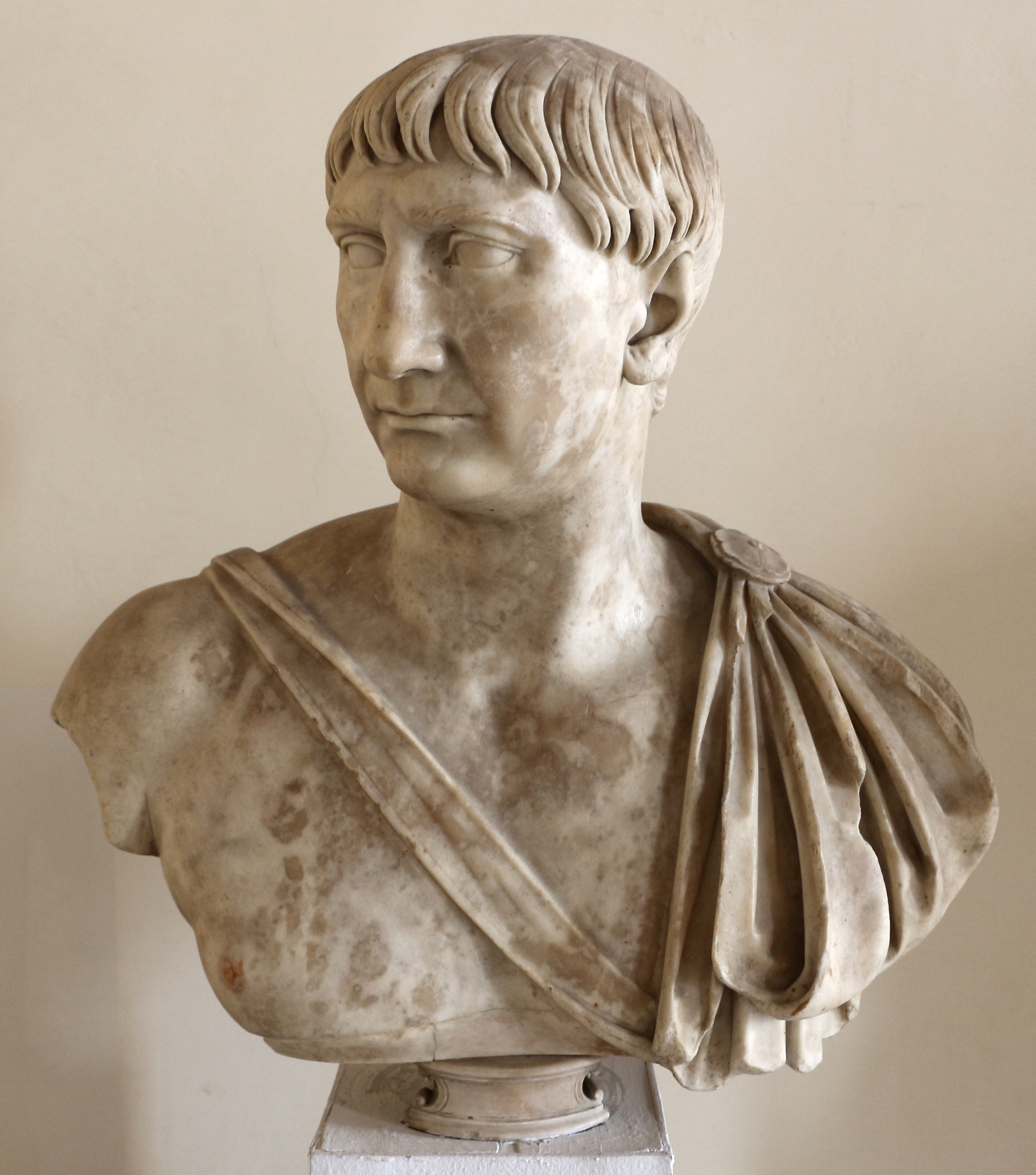 Museo Archeologico Nazionale This is a photo of a monument which is part of cultural heritage of Italy.